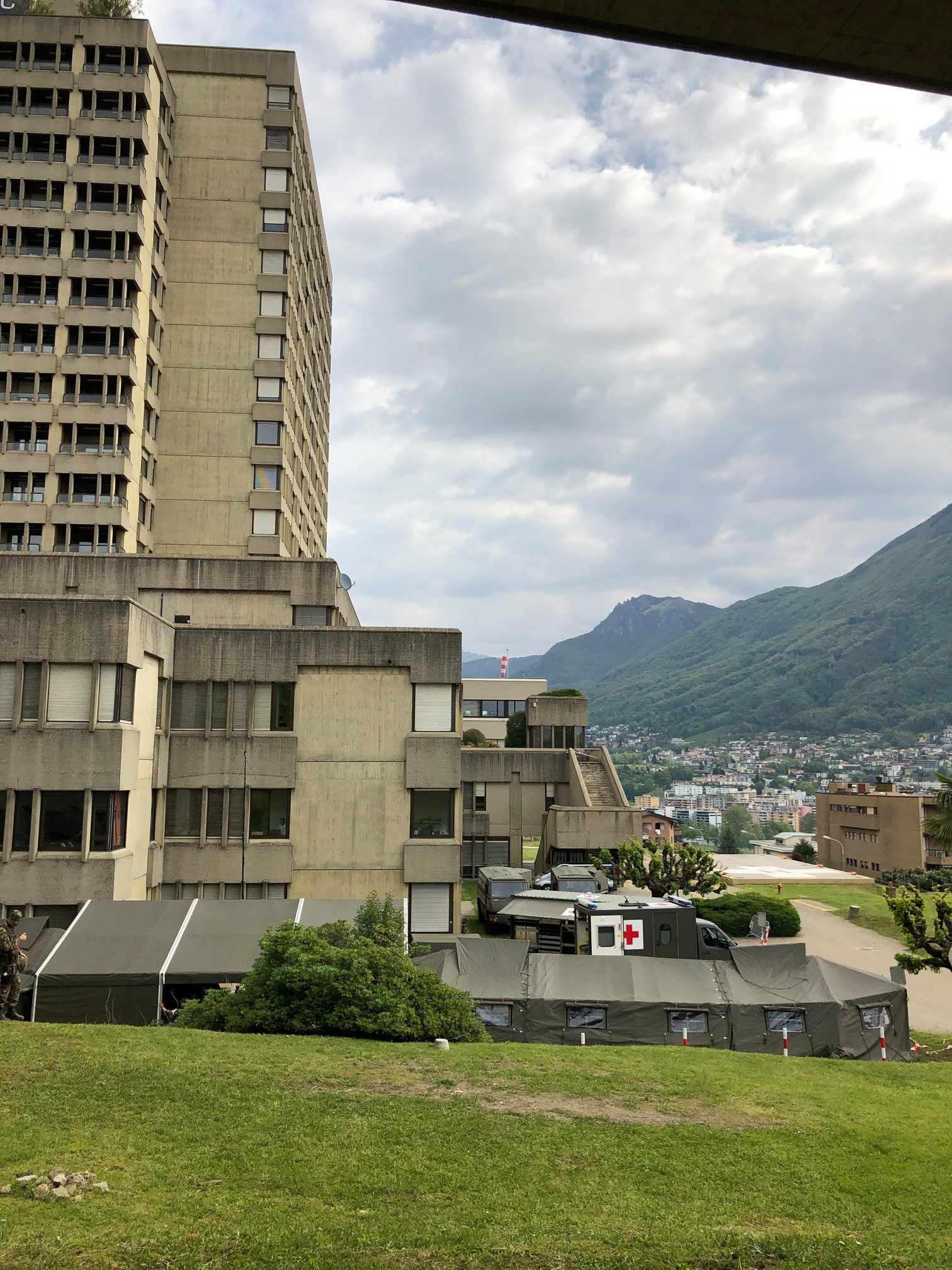 tende san presso ospedale civico